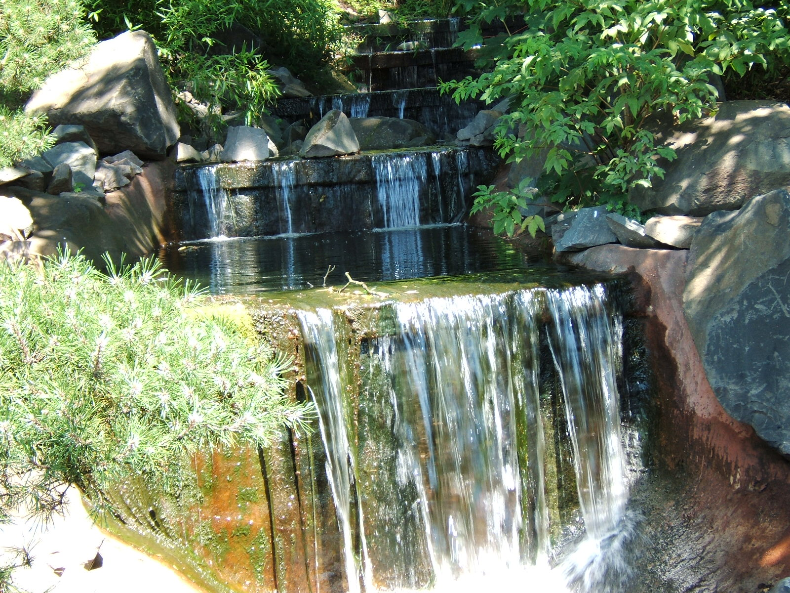 Kaskaden im Japanischen Garten Kaiserslautern